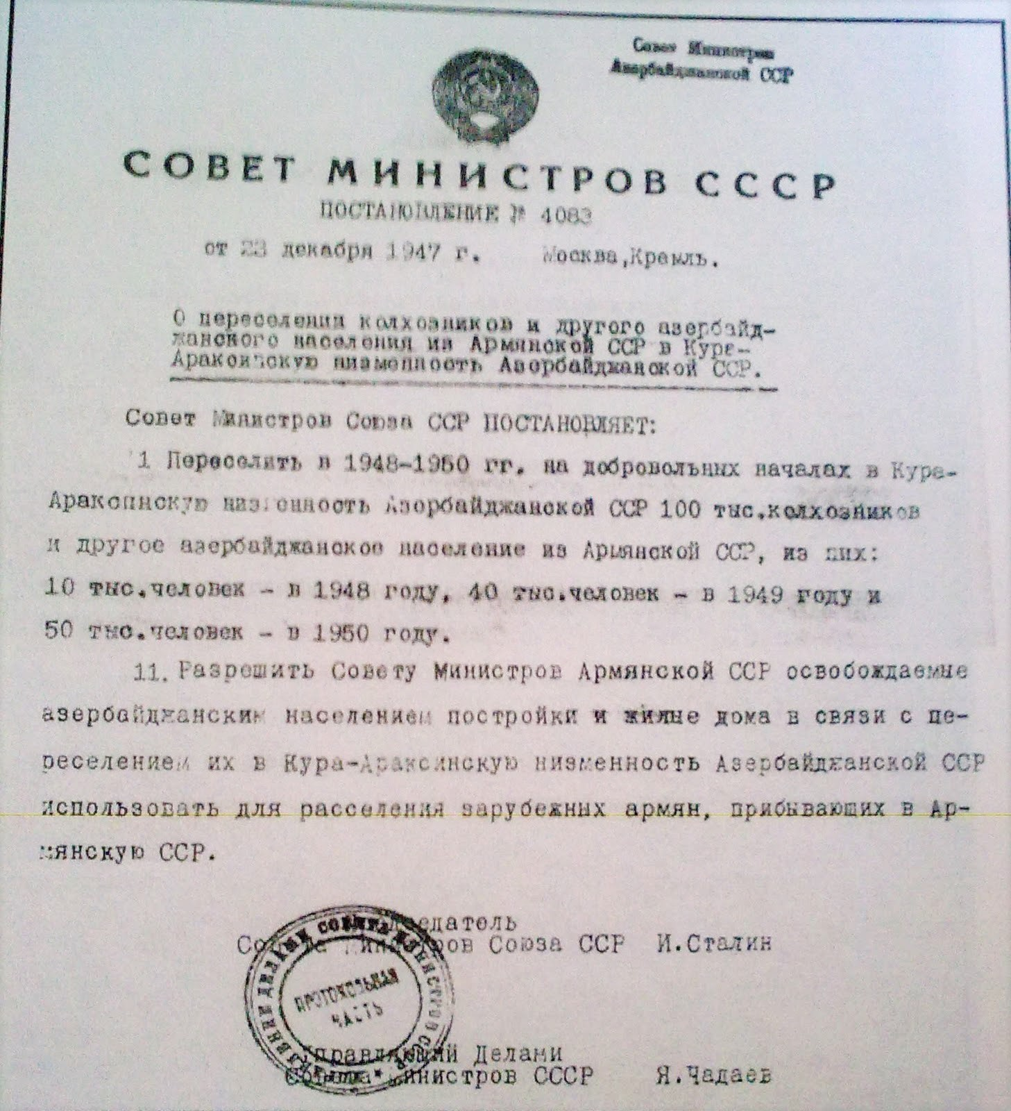 1947 году 23 декабря Сталин подписал указ о переселение местного азербайджанского населения из Армянской ССР и заселения на их земли и в их дома зарубежных армян. Источник информации (цитата) не указан.